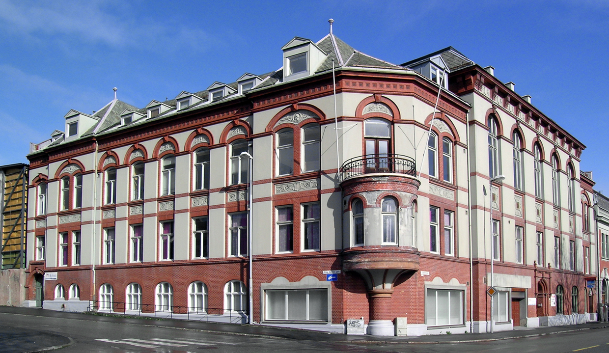 Håndverkerforeningen, Kjøpmannsgata 12, Trondheim. Bygd 1899. Arktekter: Johan Christensen og Lars Solberg